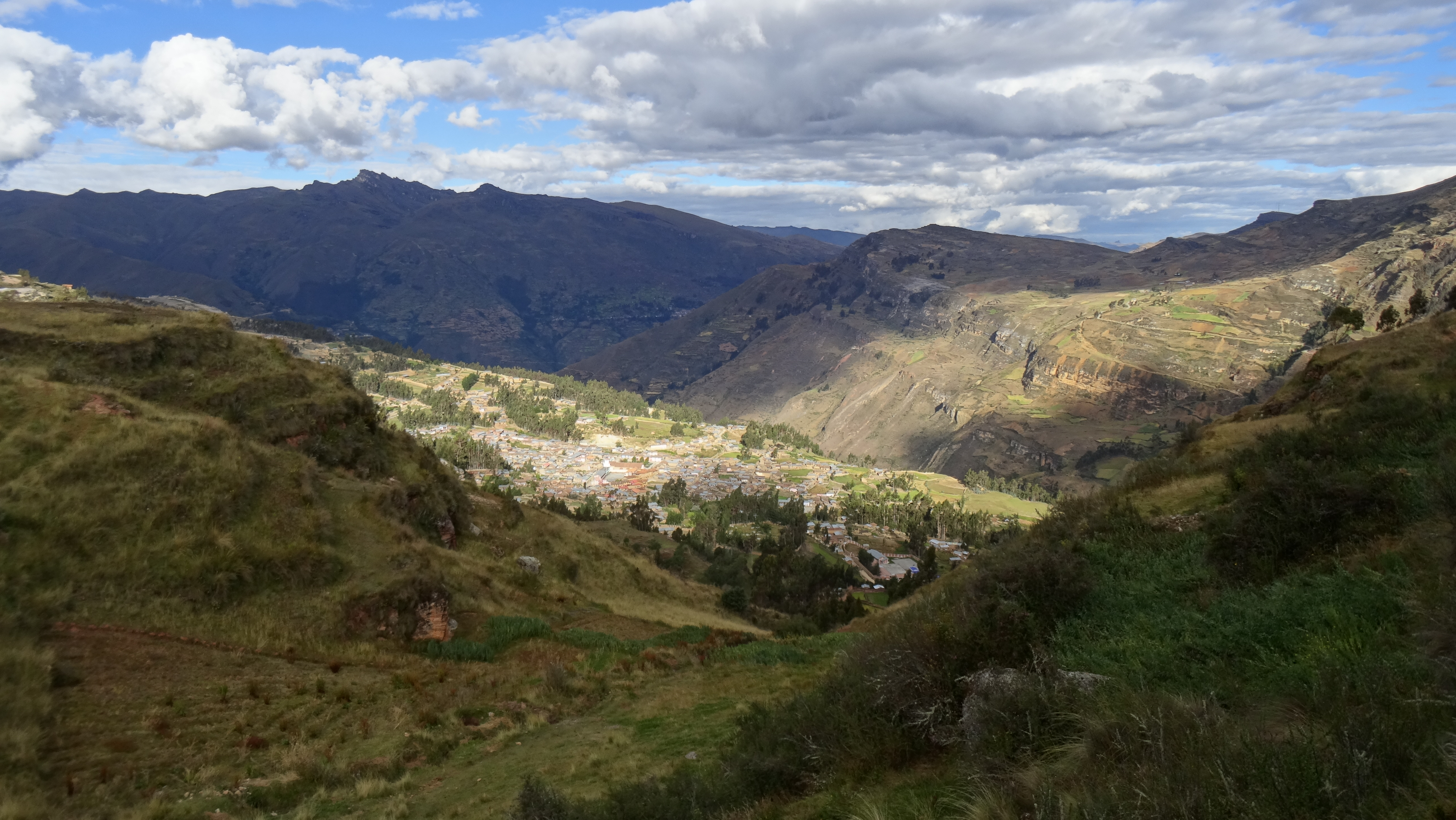 Parte del distrito de Punchao, al centro su núcleo urbano y capital seguido de la quebrada del Pucroj y al fondo el cañon del Marañón.